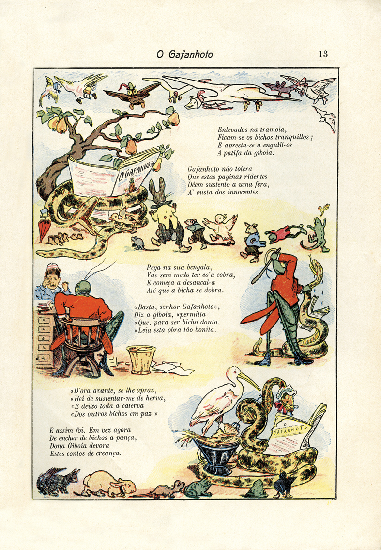 Pagina da revista O Gafanhoto